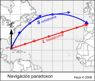 Navigációs paradoxon